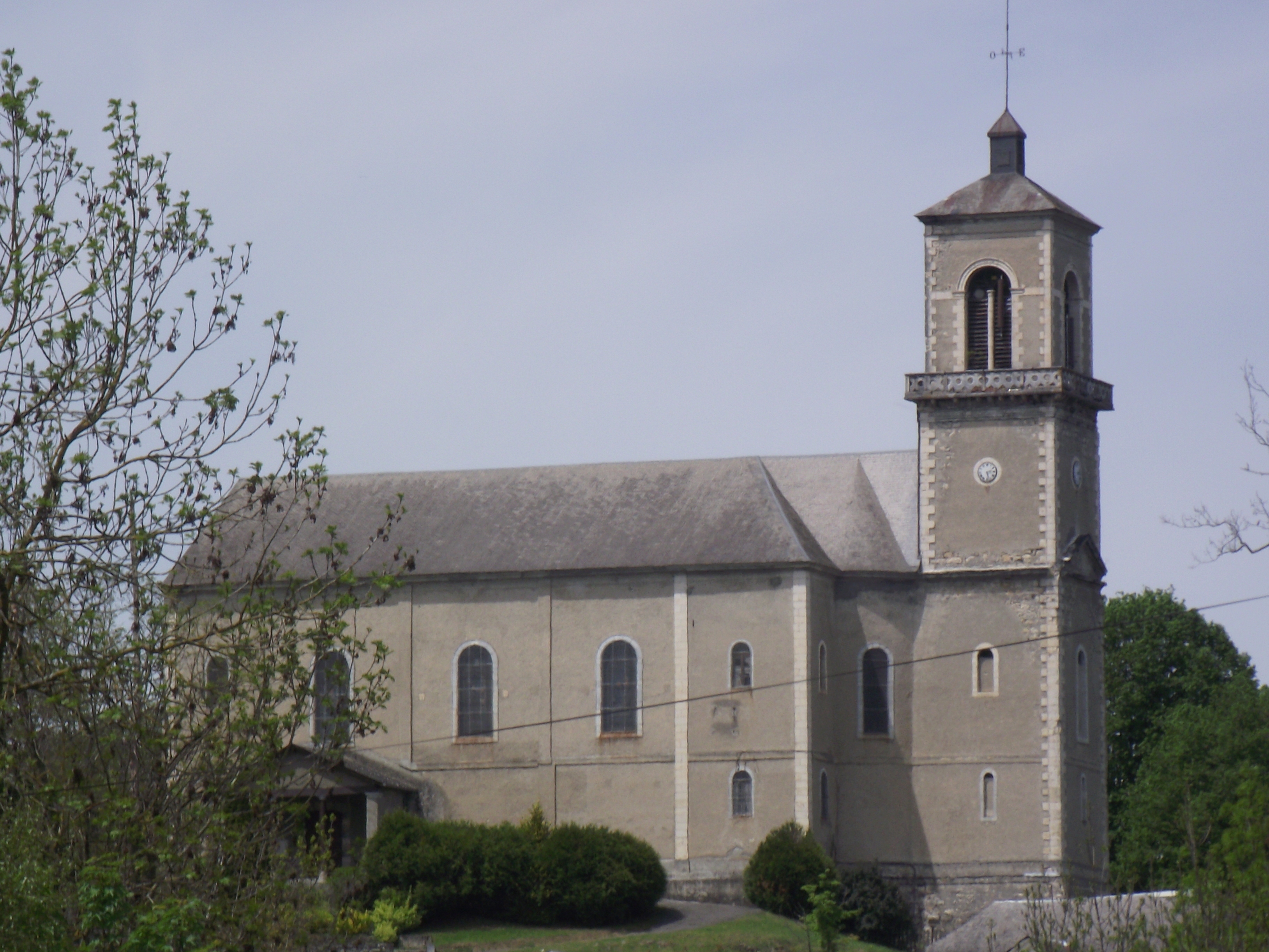 Église Saint-Hilaire de Montgaillard (65)